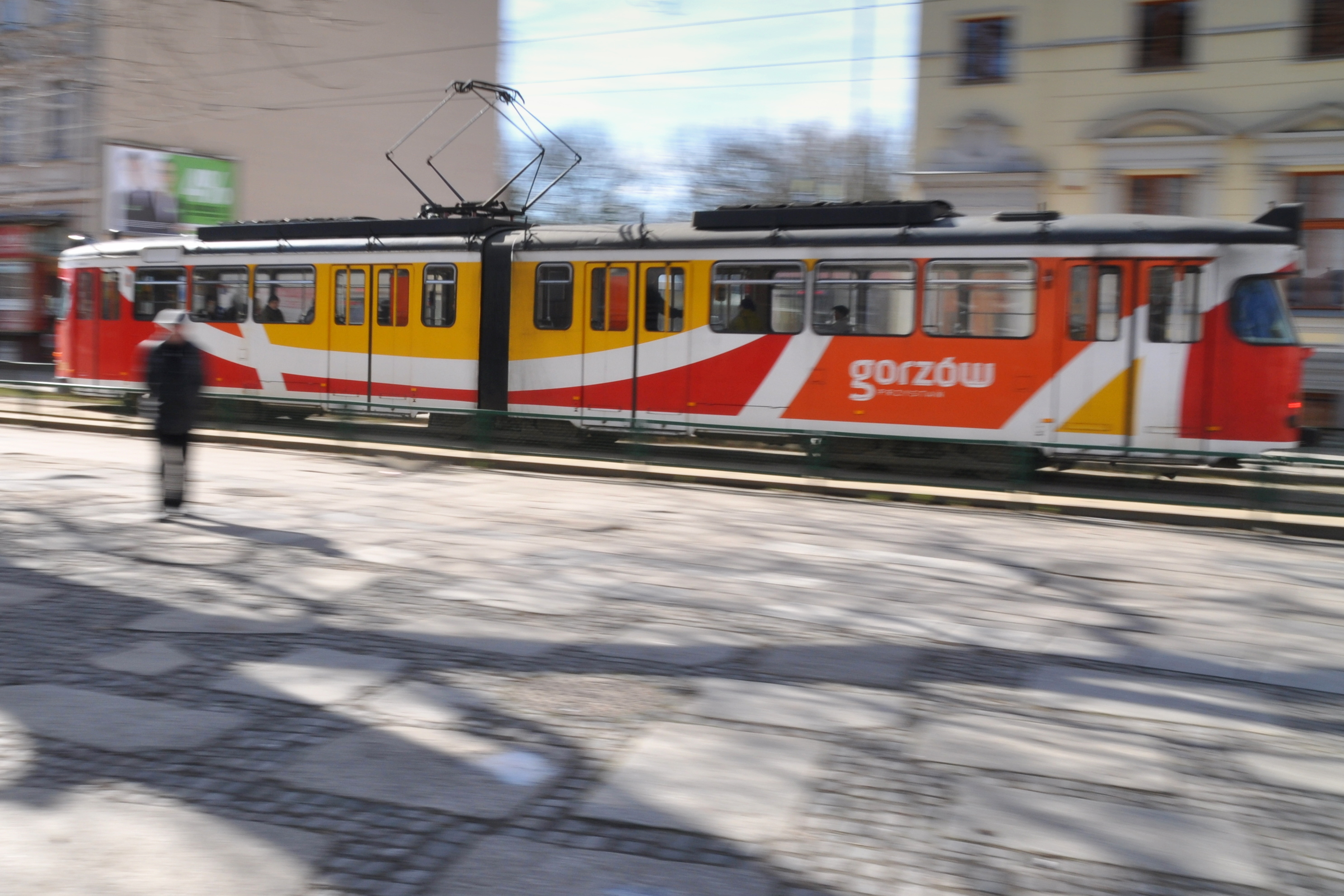 Gorzów Wlkp., ul. Chrobrego. Tramwaj Wegmann 6ZGTW w barwach " Gorzów Przystań "